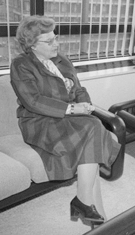 Title: Bonn, Ministerin Wilms People in the image: Wilms, Dorothea Dr. (Bundesministerin für Innerdeutsche Beziehungen, Bundesministerin für Bildung und Wissenschaft, CDU), Bundesrepublik Deutschland Factual corrections and alternative descriptions are encouraged separately from the original description. Additionally errors can be reported at this page to inform the Bundesarchiv. Original historic description: 15.-17.12.1986 16.12 Bundesministerin Dr. Dorothee Wilms im Bundesministerium für Bildung und Wissenschaft